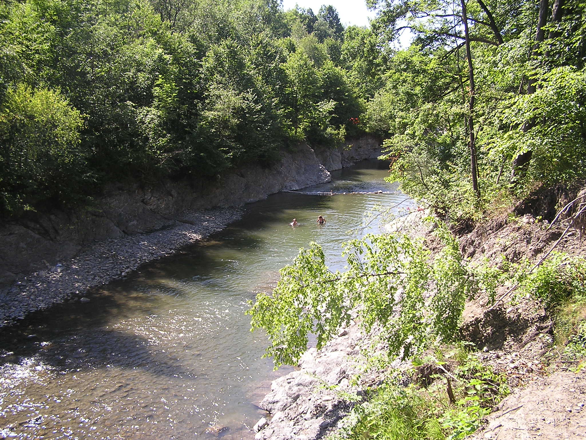 Profil Morávky